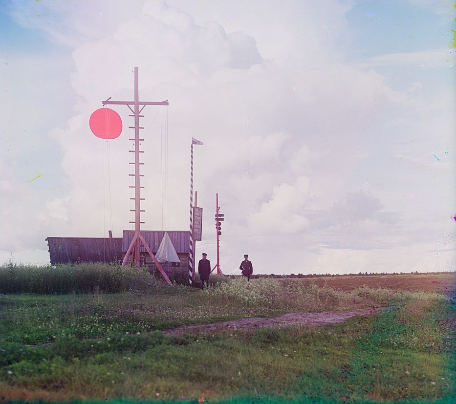 Сигнальная мачта на берегу Шексны в деревне Бурково (Череповецкий уезд)